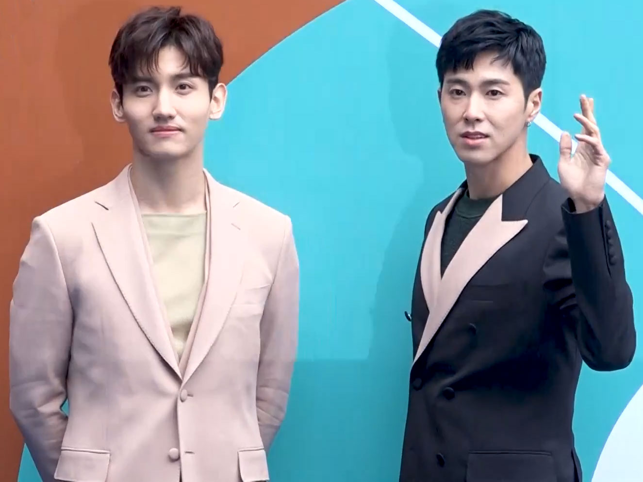 “패션위크에 떳다” ... 동방신기, 핑크로 포인트 #동방신기 #TVXQ